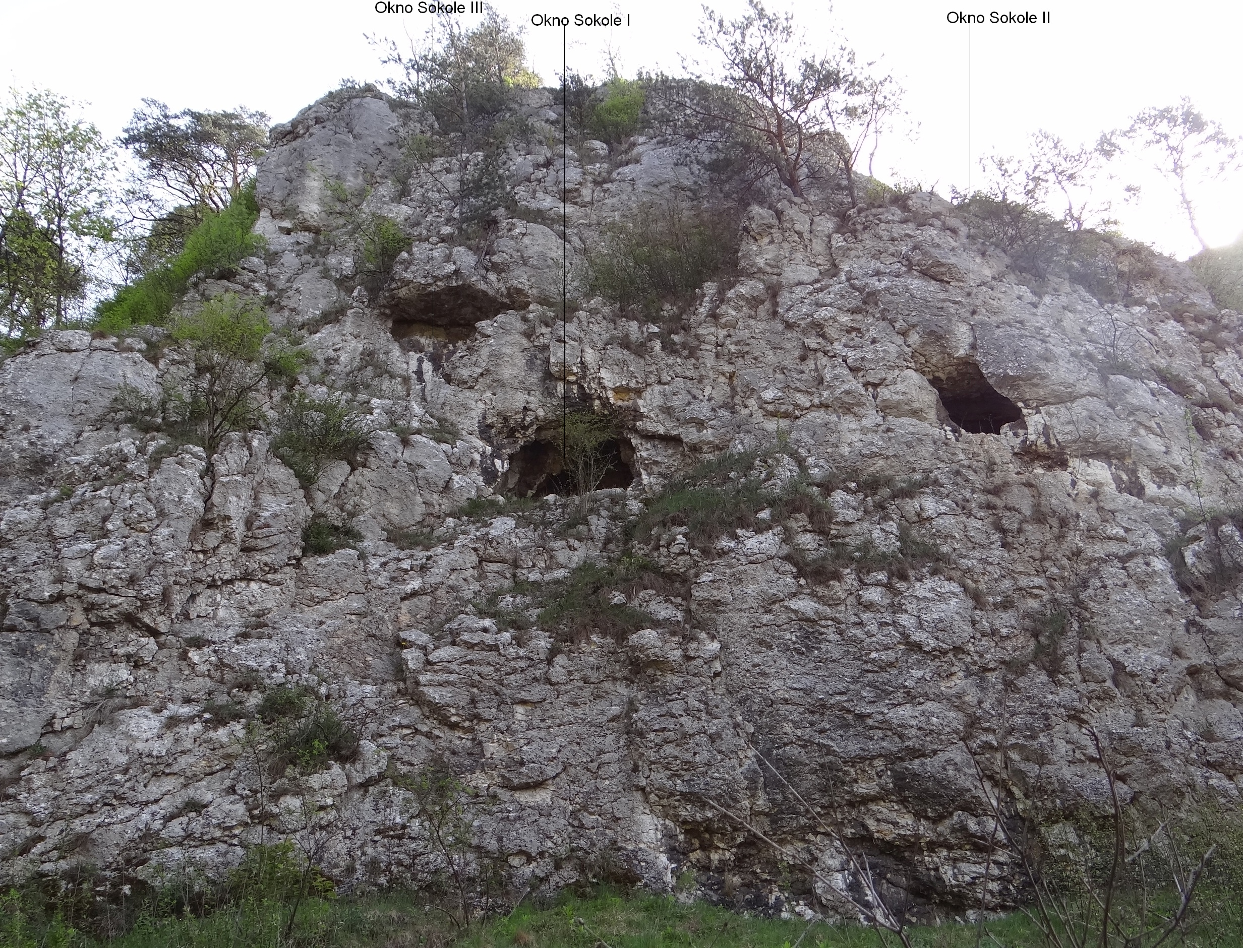 Turnia z Grotami w Dolinie Bolechowickiej. Otwory 3 schronisk